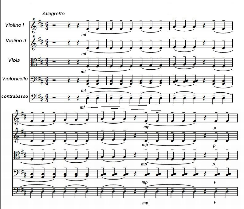 Début de la symphonie n°2 de Jean Sibelius